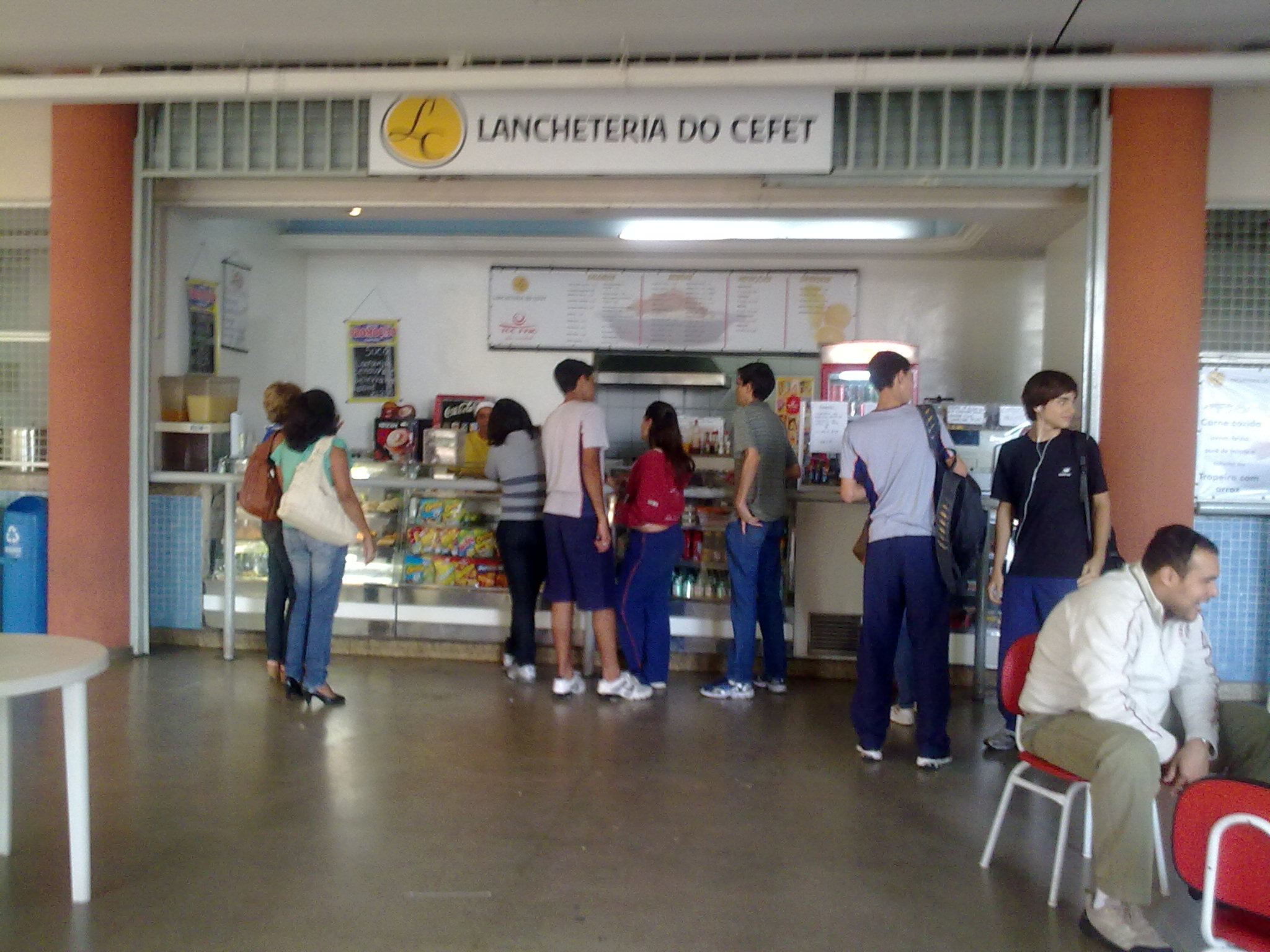 Cantina no campus I do Cefet-MG, em Belo Horizonte, Brasil.